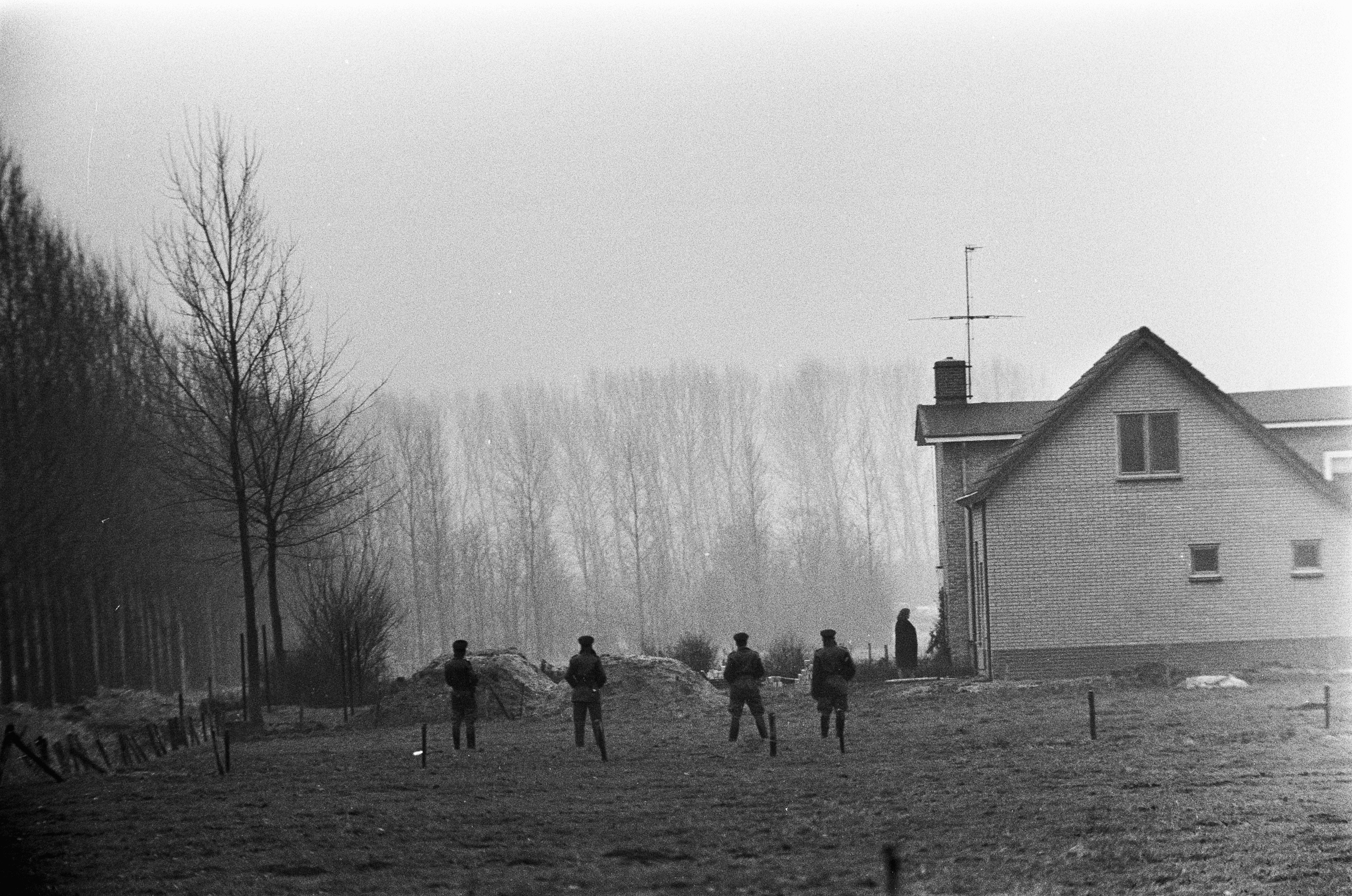 Collectie / Archief : Fotocollectie Anefo Reportage / Serie : [ onbekend ] Beschrijving : Overvallers van postagentschap gijzelen gezin in boerderij in Deil, de boerderij met bij de deur de moeder van een van de verdachten en op voorgrond agenten Datum : 30 januari 1973 Locatie : Deil Trefwoorden : agenten, boerderijen, gezinnen, gijzelingen Fotograaf : Peters, Hans / Anefo Auteursrechthebbende : Nationaal Archief Materiaalsoort : Negatief (zwart/wit) Nummer archiefinventaris : bekijk toegang 2.24.01.05 Bestanddeelnummer : 926-1886